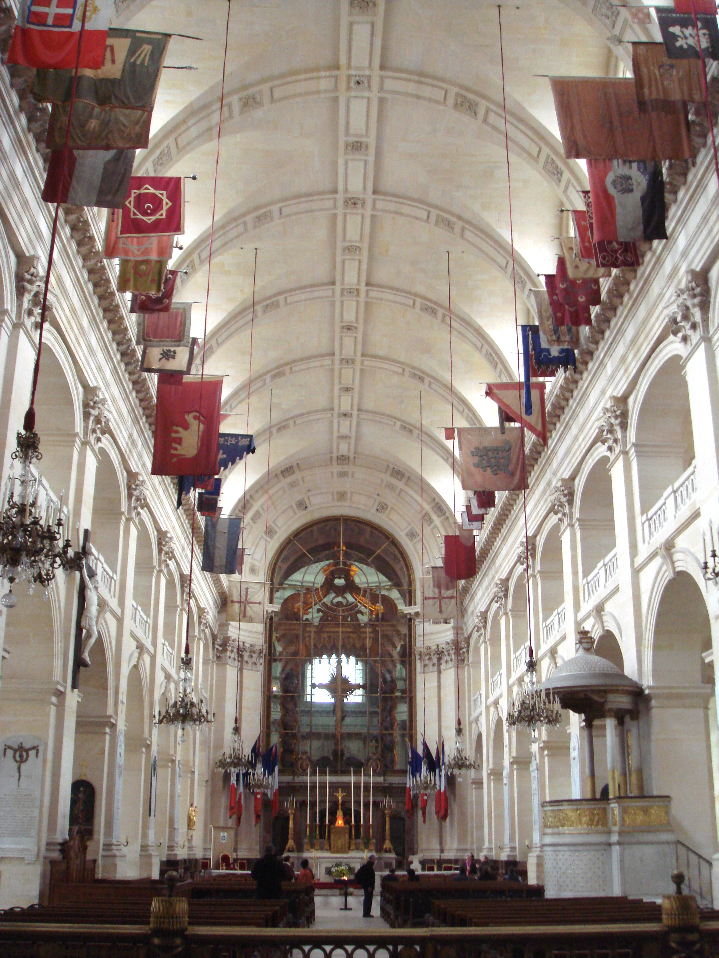 Nef de la Cathédrale Saint-Louis-des-Invalides, Hôtel des Invalides, Paris, France.